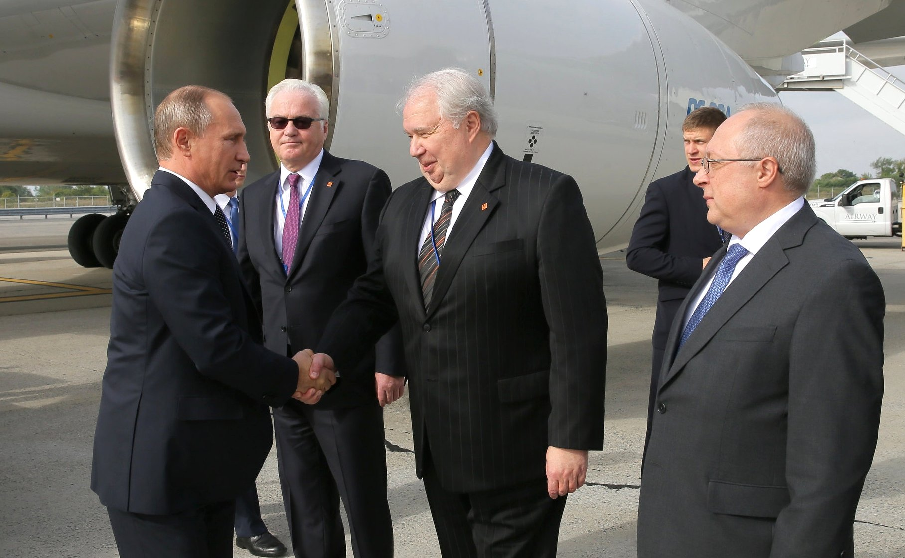 Прибытие в Нью-Йорк Президента России. Владимир Путин с постоянным представителем России при ООН Виталием Чуркиным (слева) и послом России в США Сергеем Кисляком